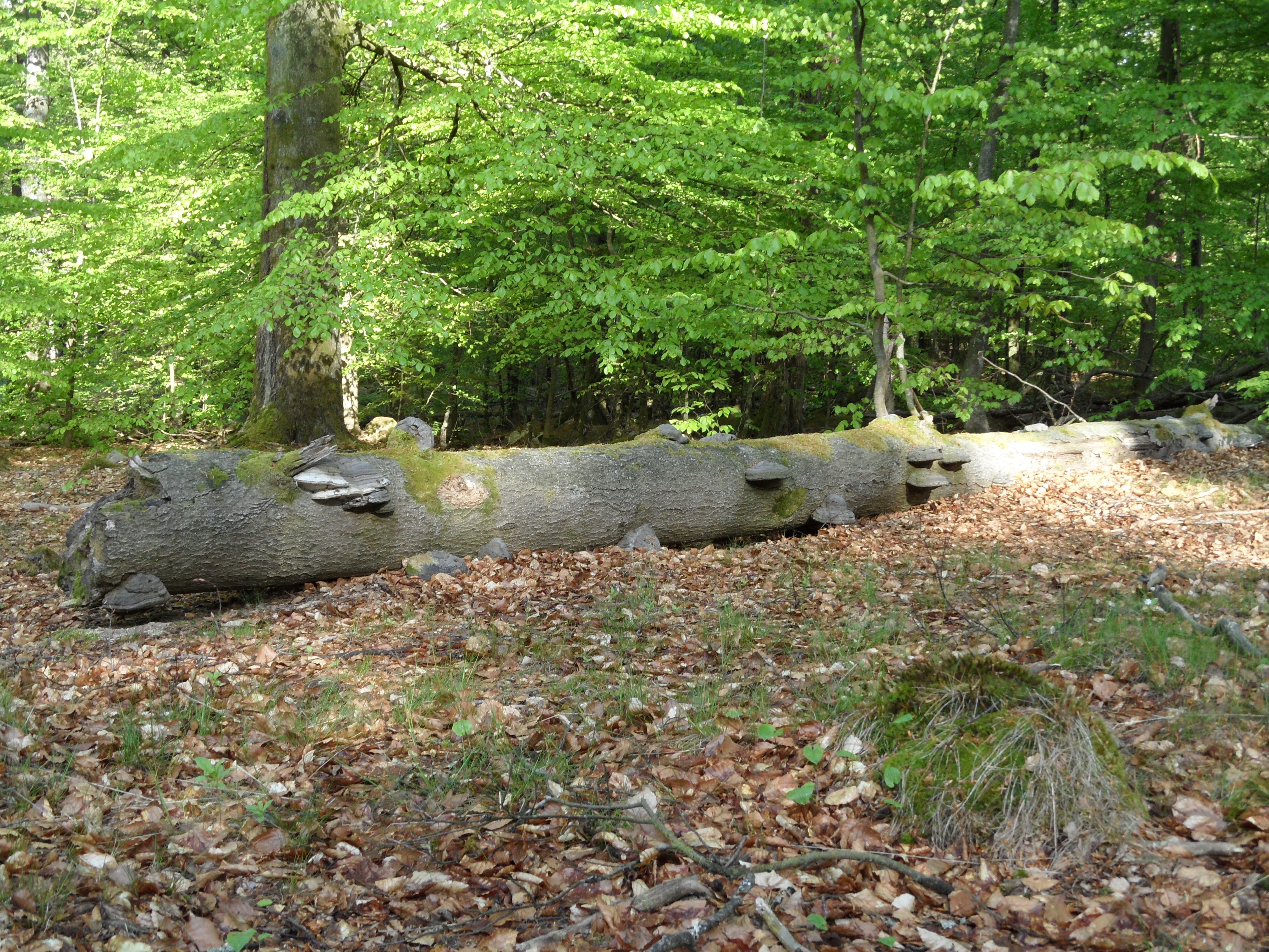 Låga sommar